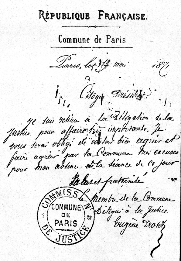 lettre autographe signée Eugène Protot, 19/05/1871